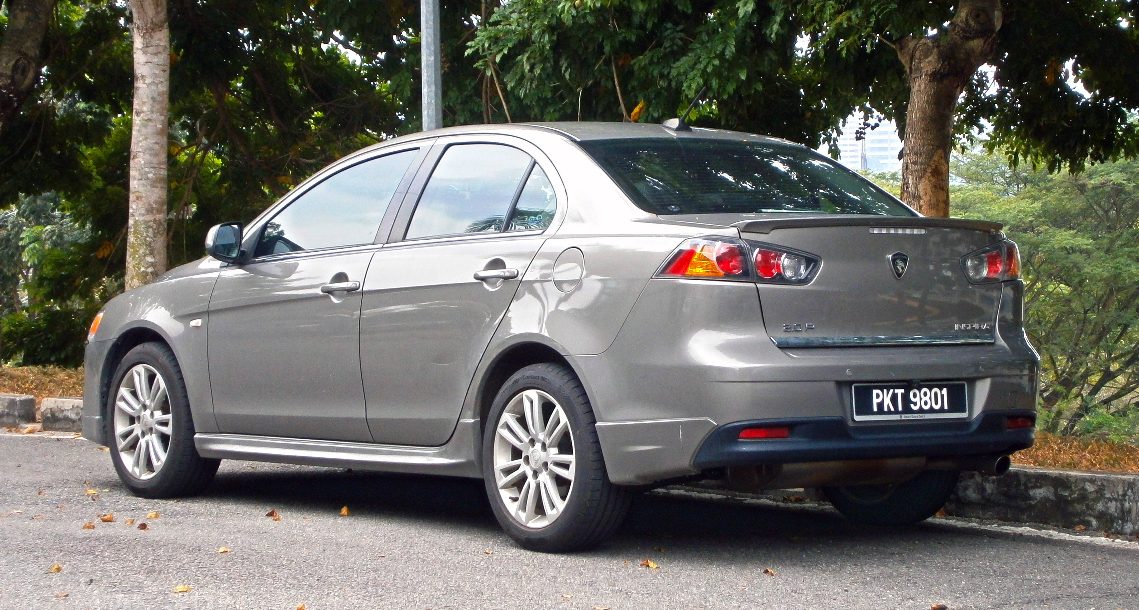 2012 Proton Inspira 2.0 Premium 4-door sedan